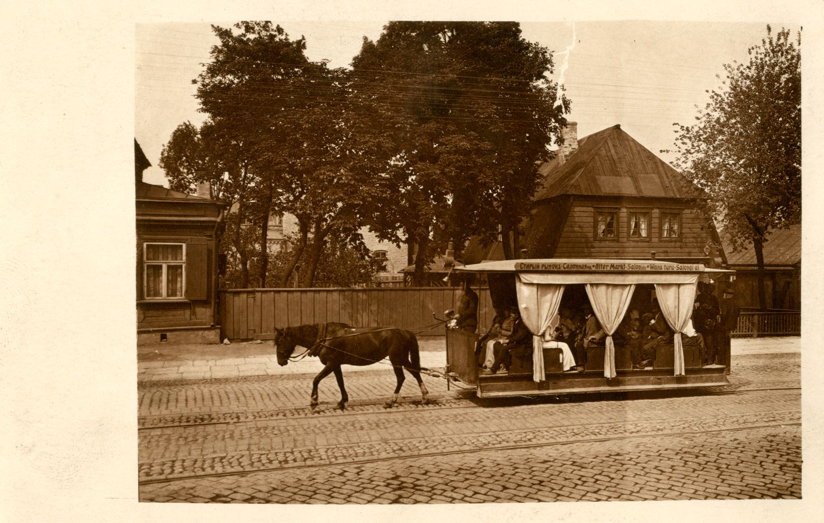 Konka Narva mnt